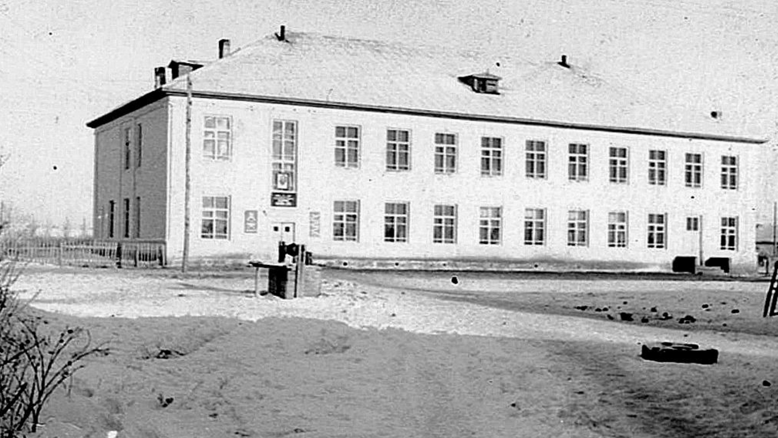 Келлеровская средняя школа. Фото сделано в 60-х годах